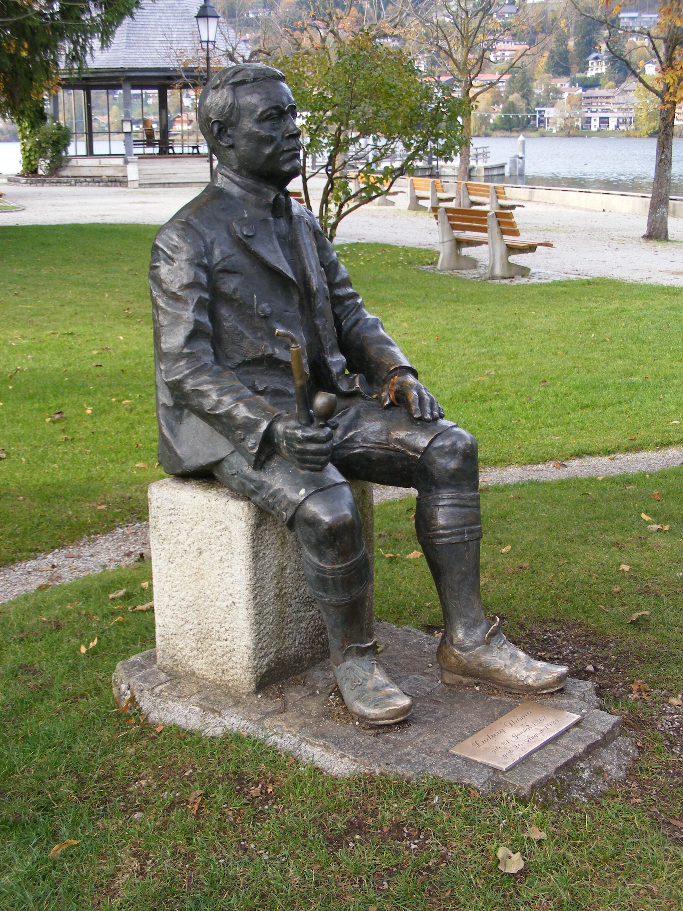 Skulptur von Ludwig Thoma in Rottach-Egern im Kurpark. Künstler: Quirin Roth, Gmund.